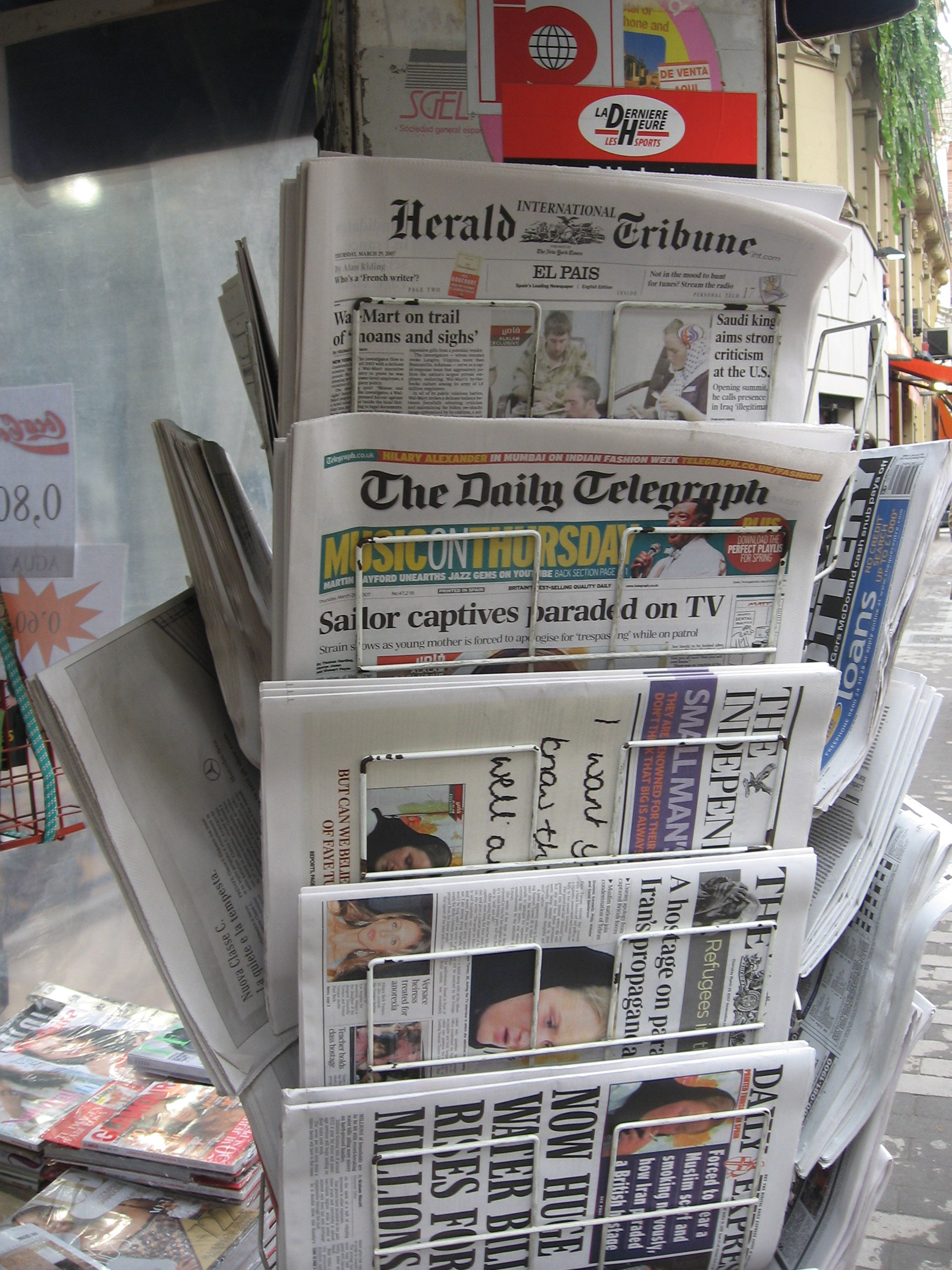 valencia